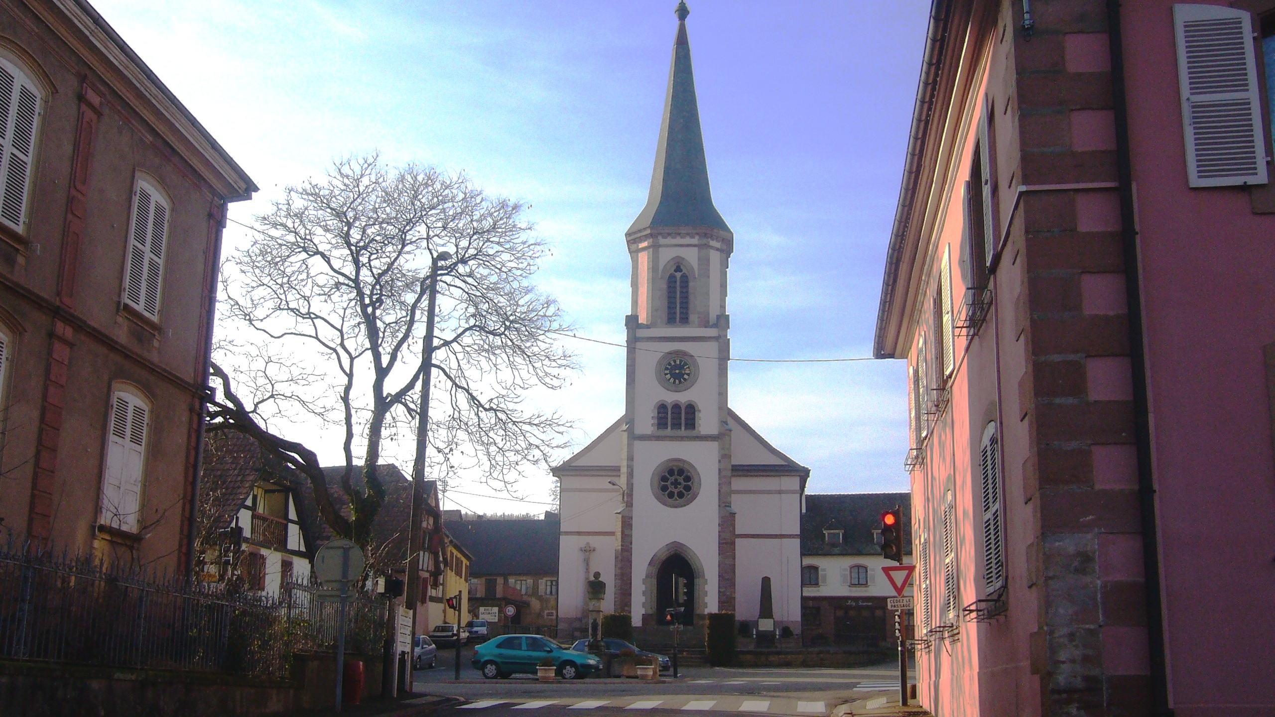 Rorschwihr,_Église Saint Michel